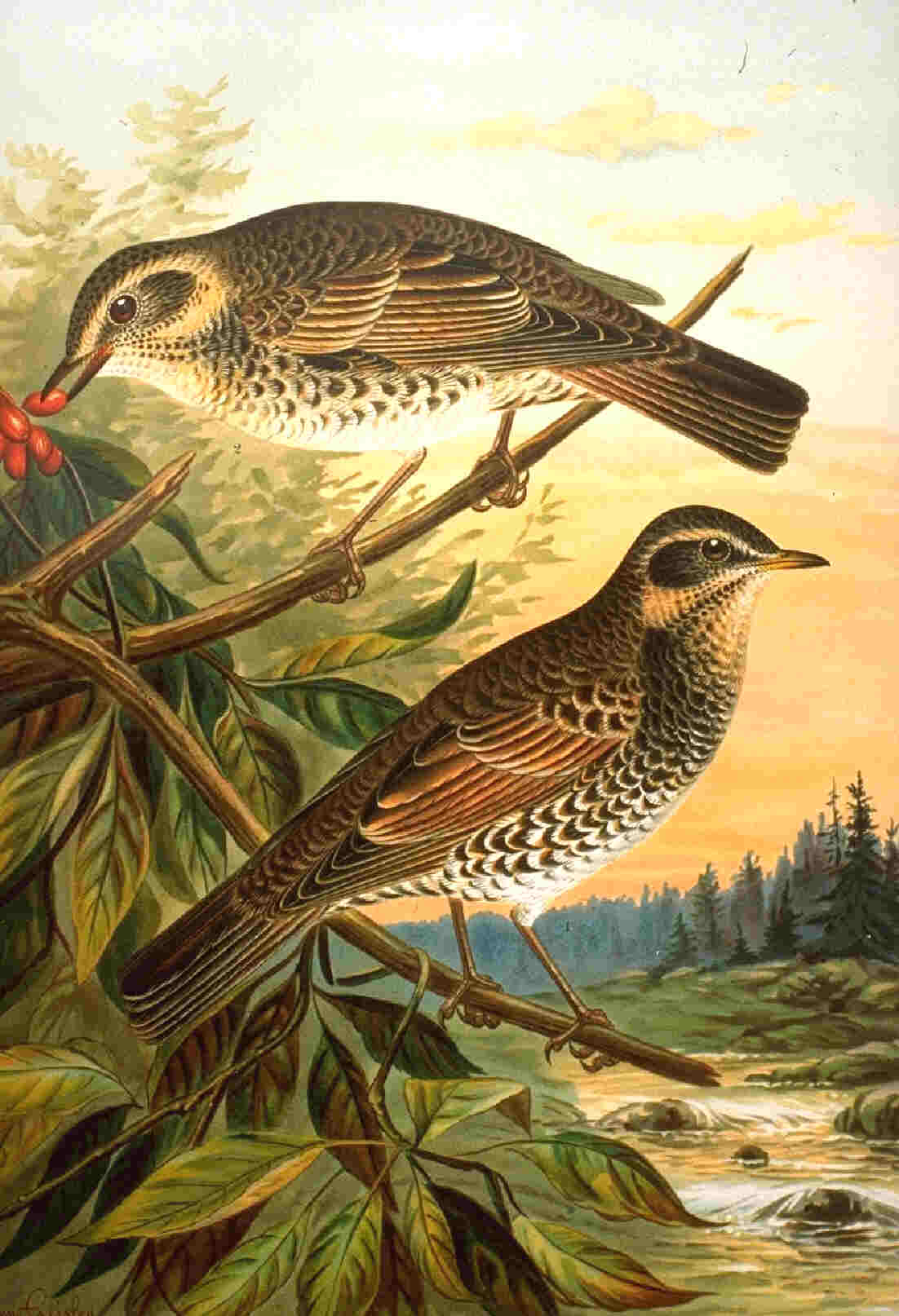 Turdus eunomus (syn. Turdus naumannii eunomus), Dusky Thrush. Drawing by Naumann